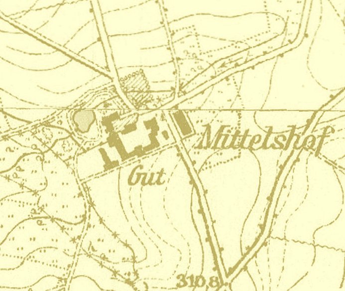 Das Gut Mittelshof. Quellgebiet des Michelsbachs.